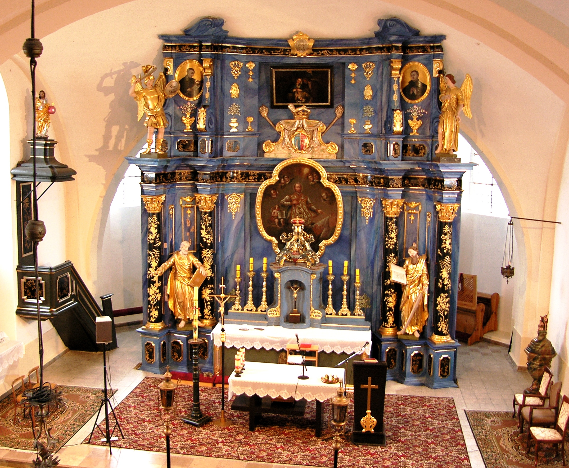 Wnętrze kościoła w Wyszanowe